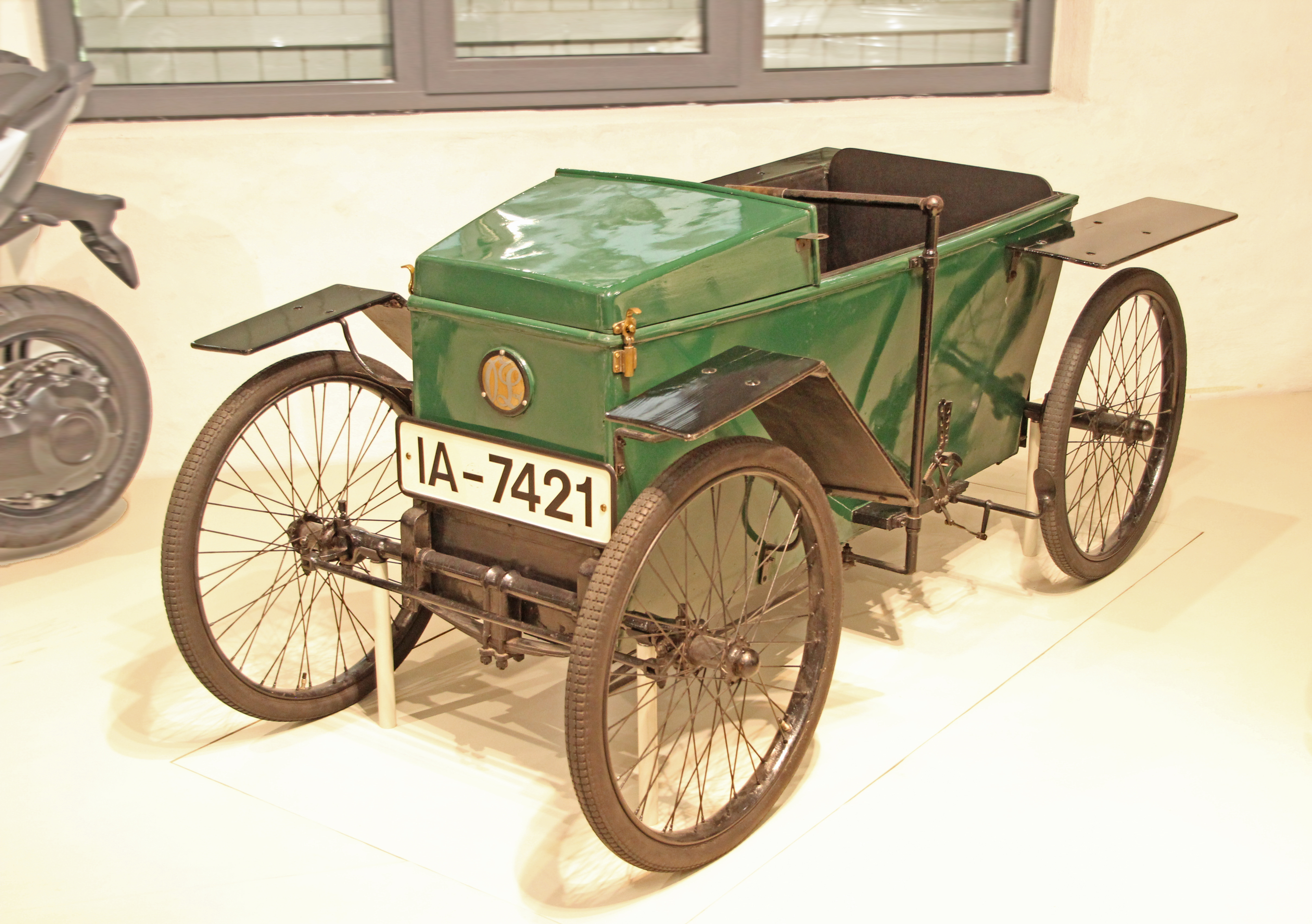 Bildinhalt: Elektrowagen der Firma Slaby-Beringer, Baujahr 1921, im Deutschen Technikmuseum Berlin Aufnahmeort: Berlin, Deutschland